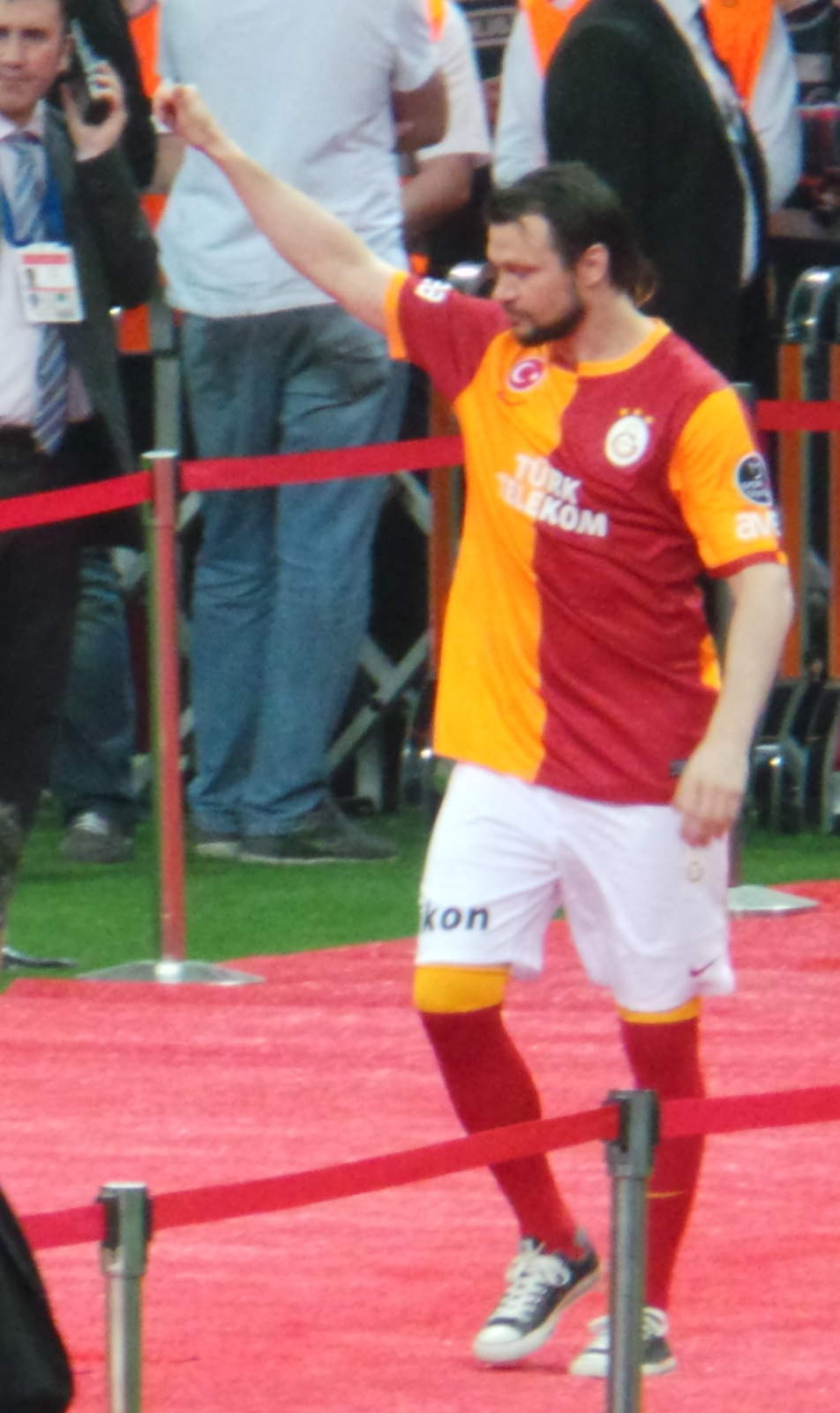 Tomáš Ujfaluši at 12 13